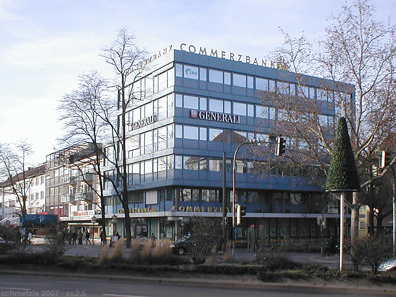 Commerzbank-Gebäude an der Allee in Heilbronn, Ecke Klarastraße.